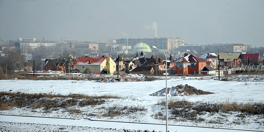 Мариуполь 2011